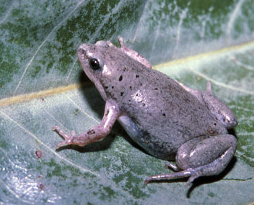 Nouvelle version de File:Gastrophryne olivacea01.jpg (découpage de l'image + balance des blancs et niveaux)